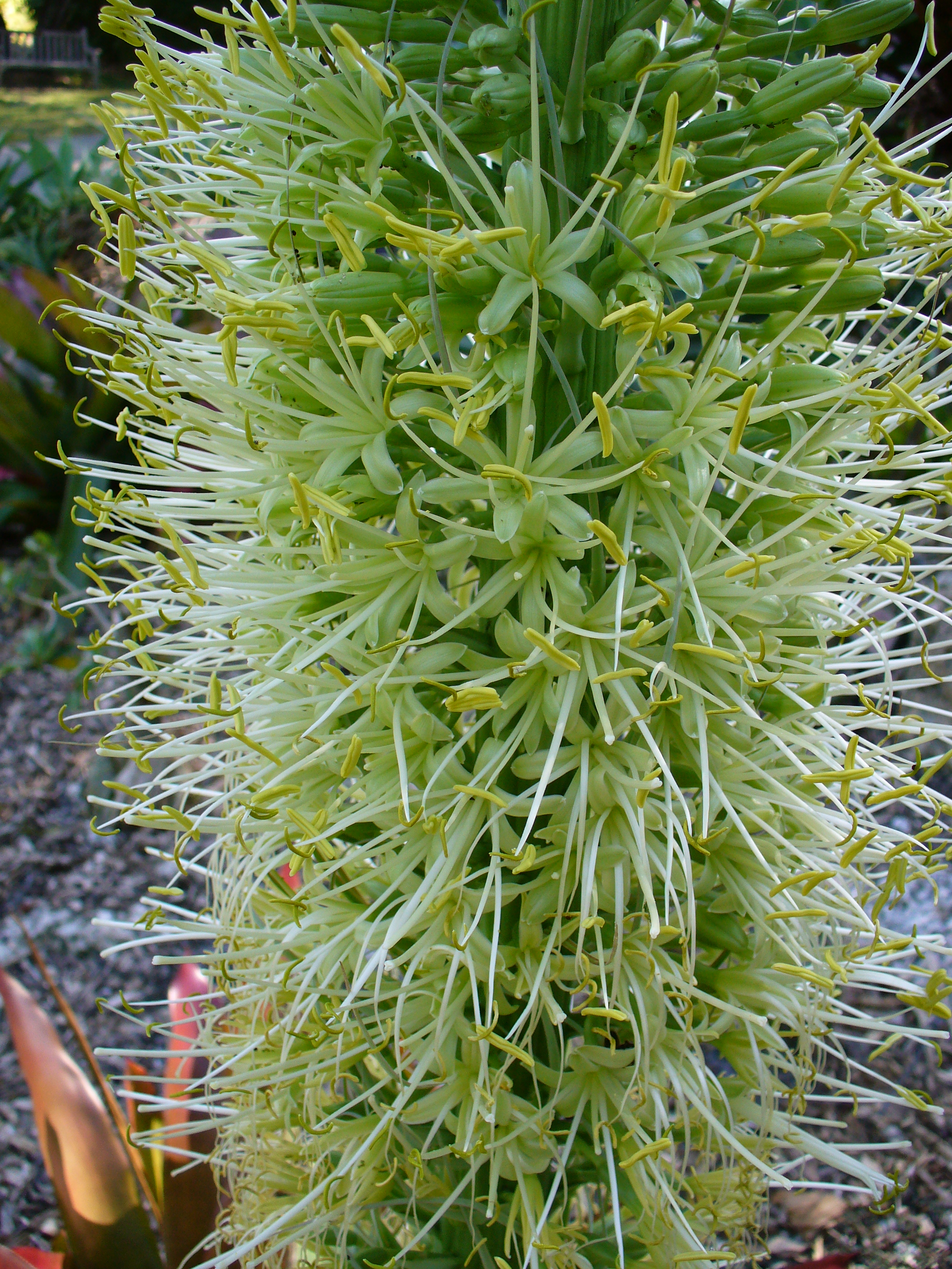 Agave attenuata Fairchild Tropical Botanic Garden, Miami, Florida, USA